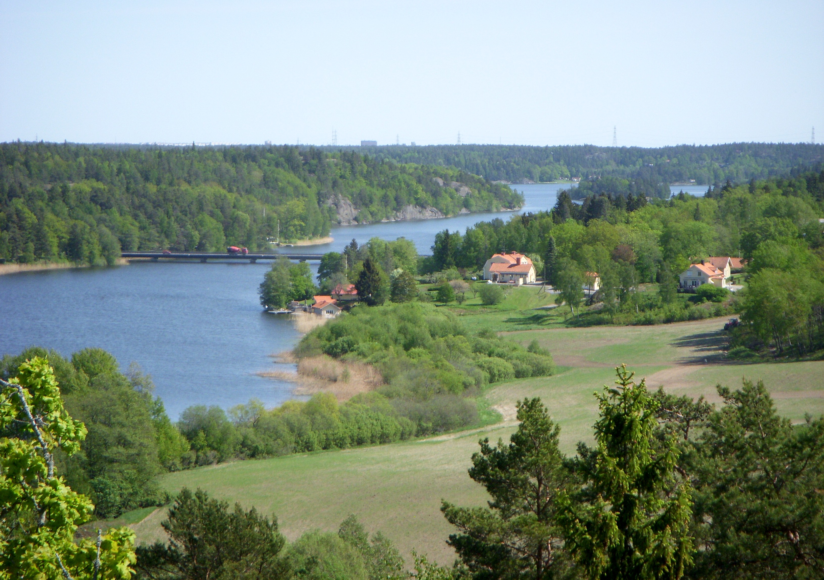 Stensättra fornborg i Huddinge kommun, utsikten mot öst över Flemingsbergsviken och Stensättra gård